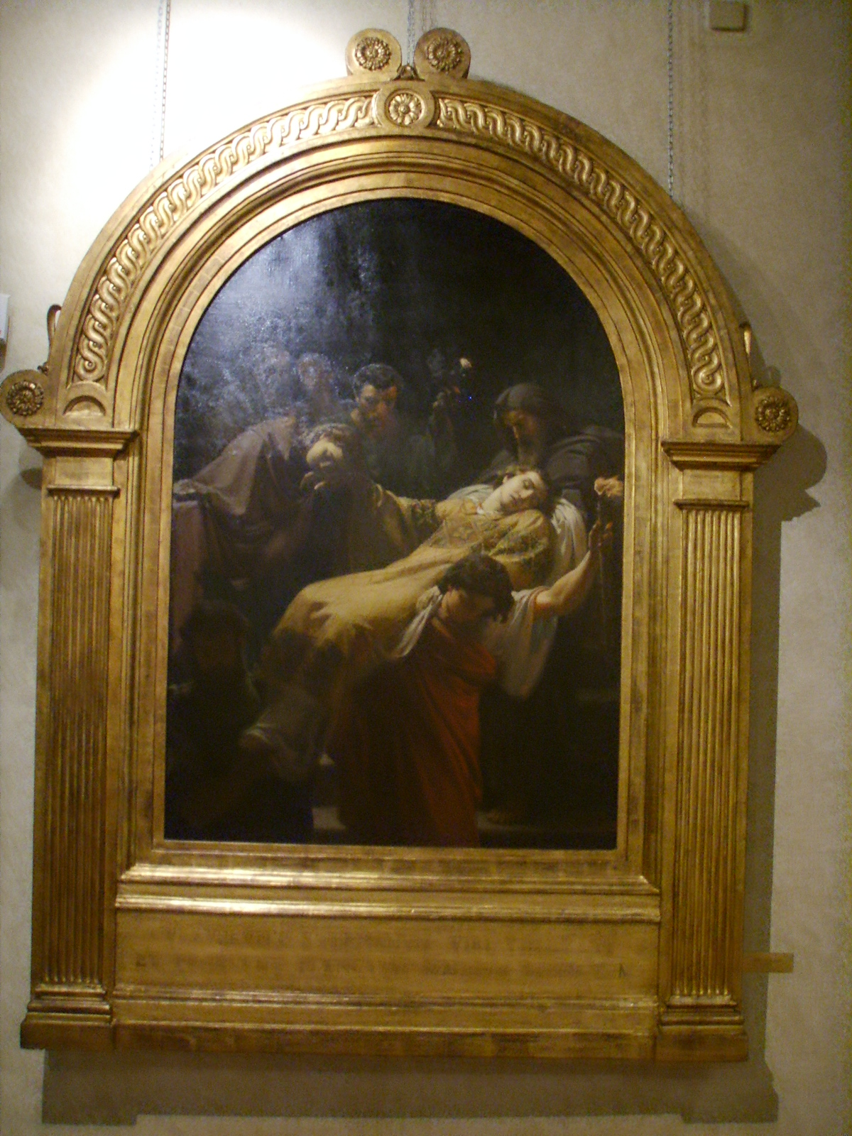 Alessandro franchi, trasporto di San Domenico